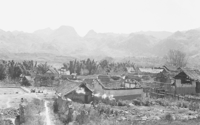 1935年沧源诏考之战后的勐董城